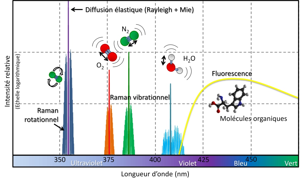 Spectroscopie d'un lidar à diffusion inélastique à 355nm